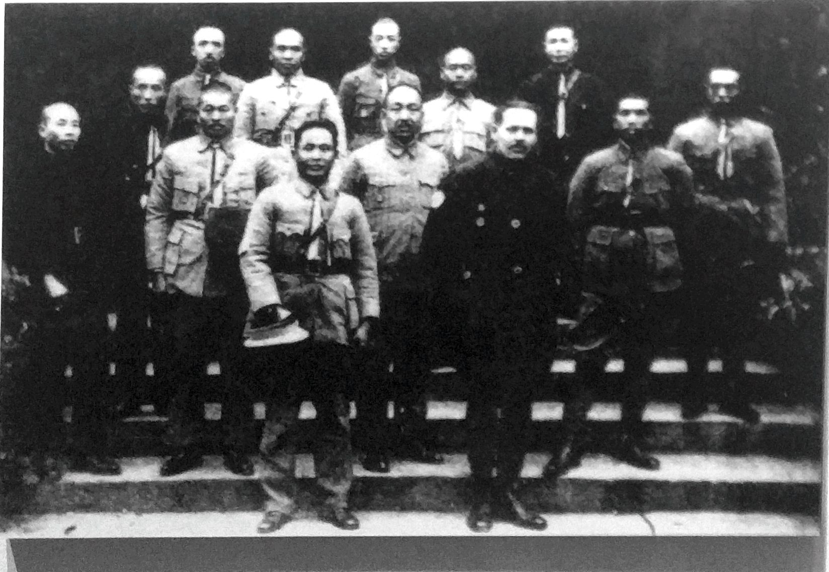 何应钦和苏联顾问合影